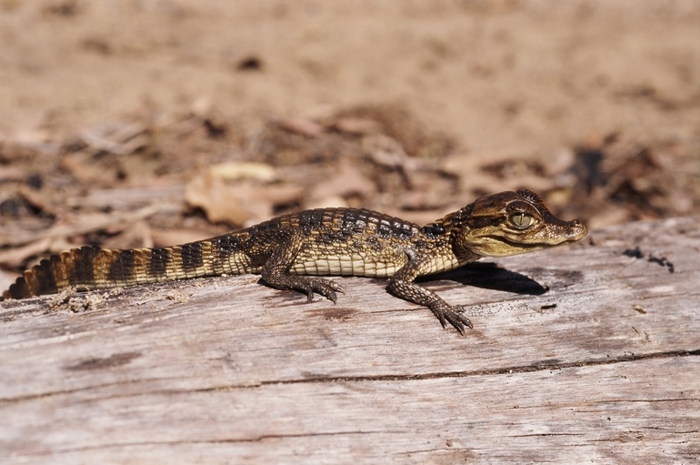 Crocodylus acutus